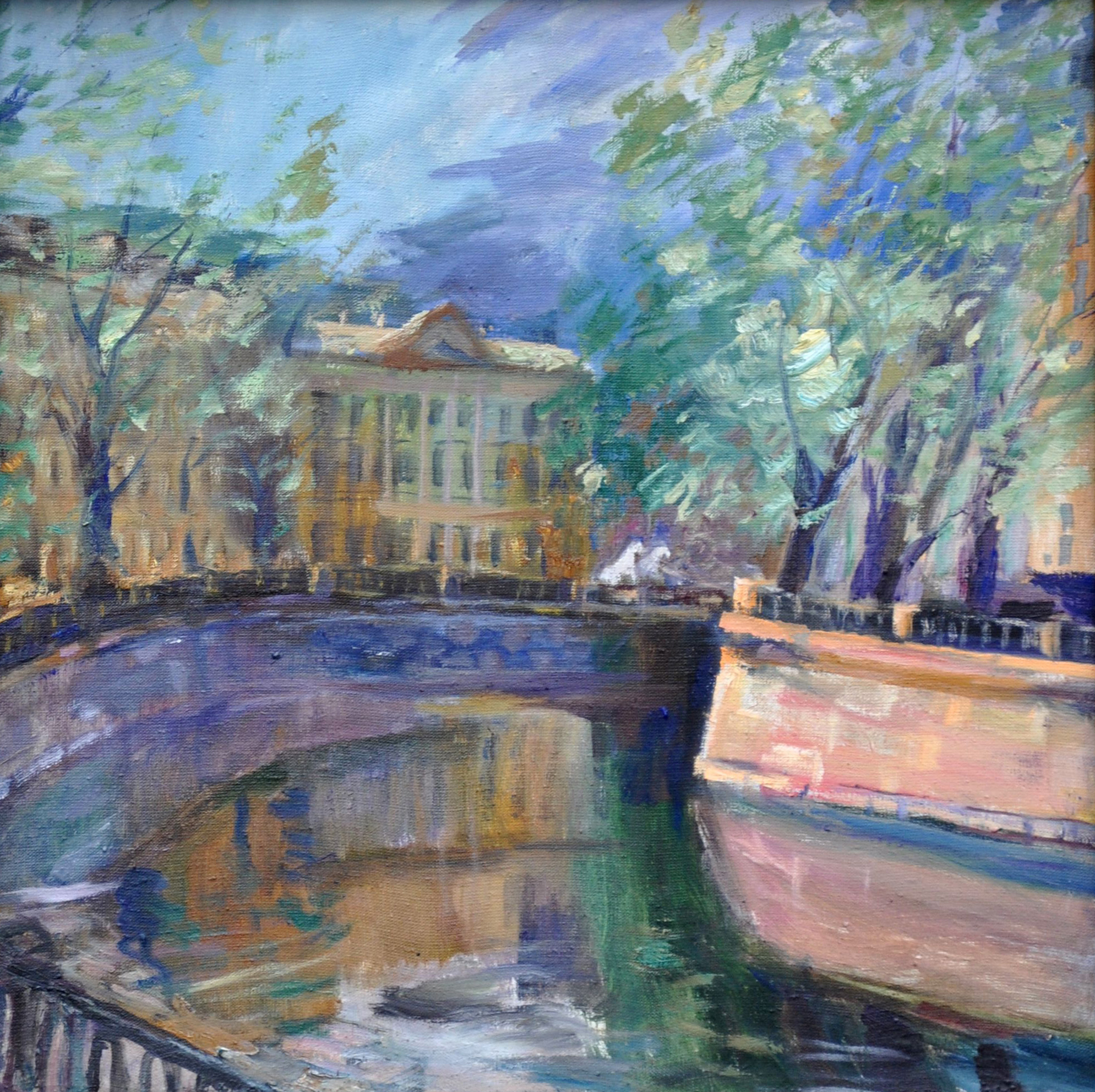 масло, холст